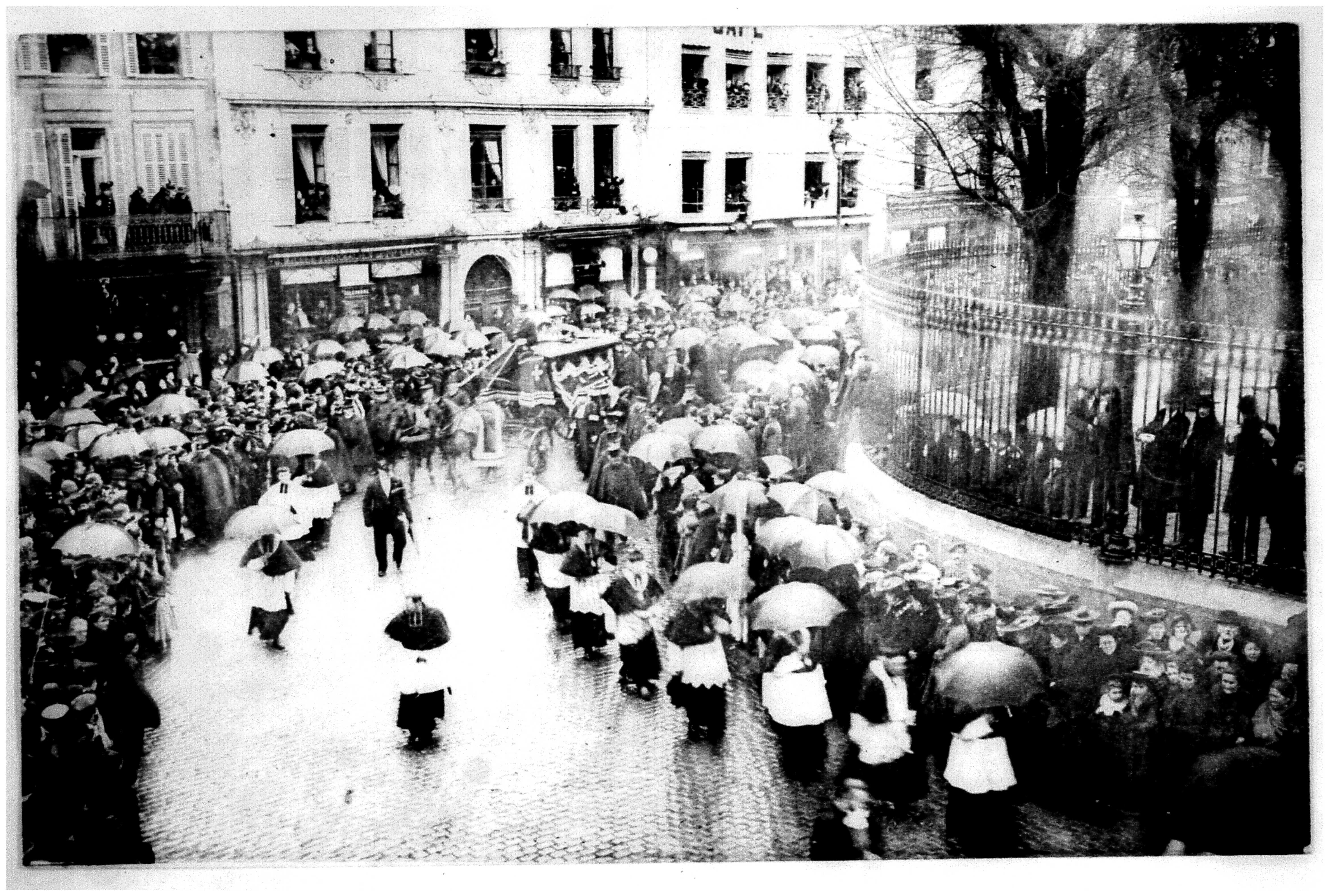 à propos de l’archevêque.